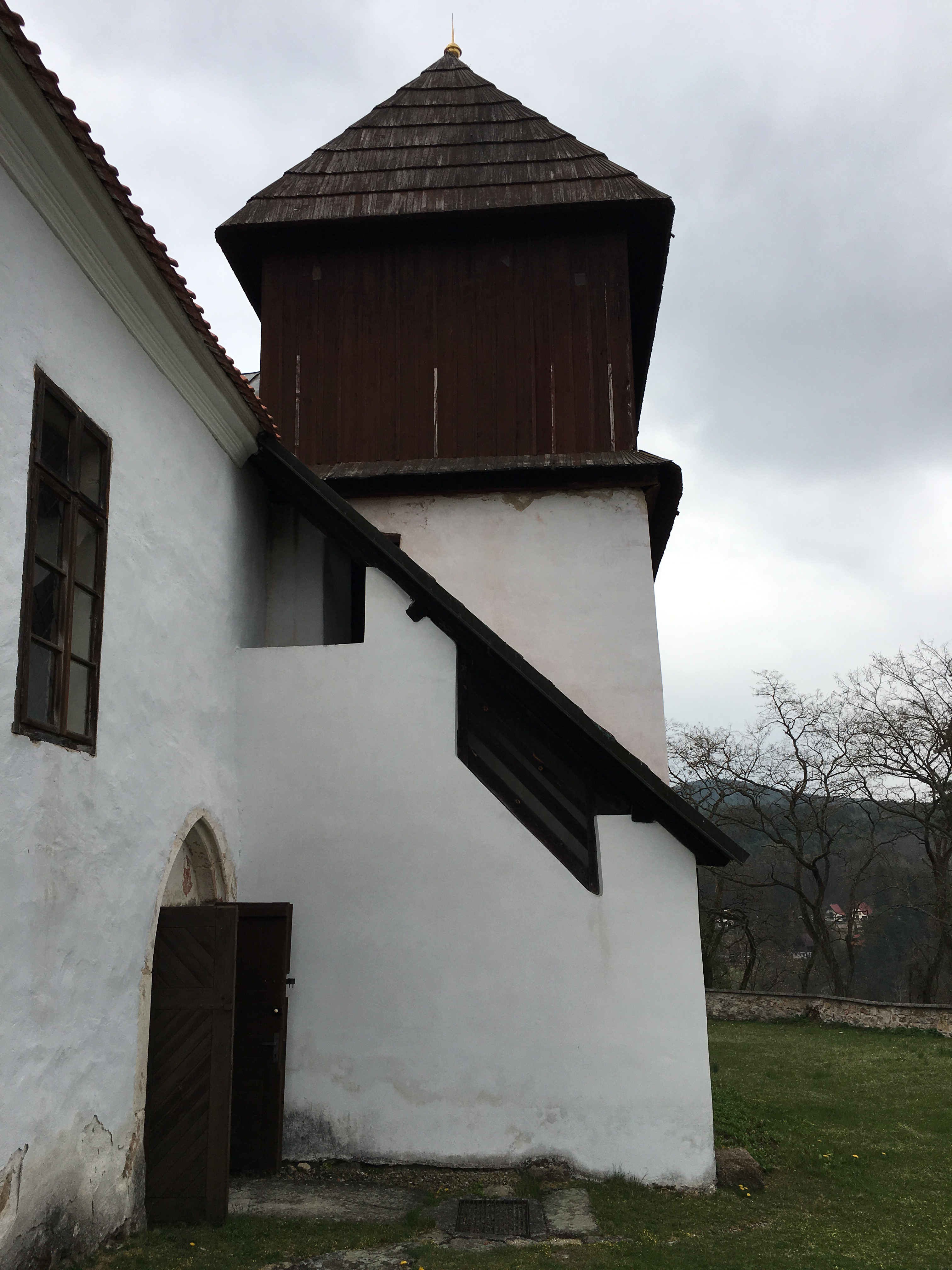 Chřešťovice, kostel sv. Jana Křtitele